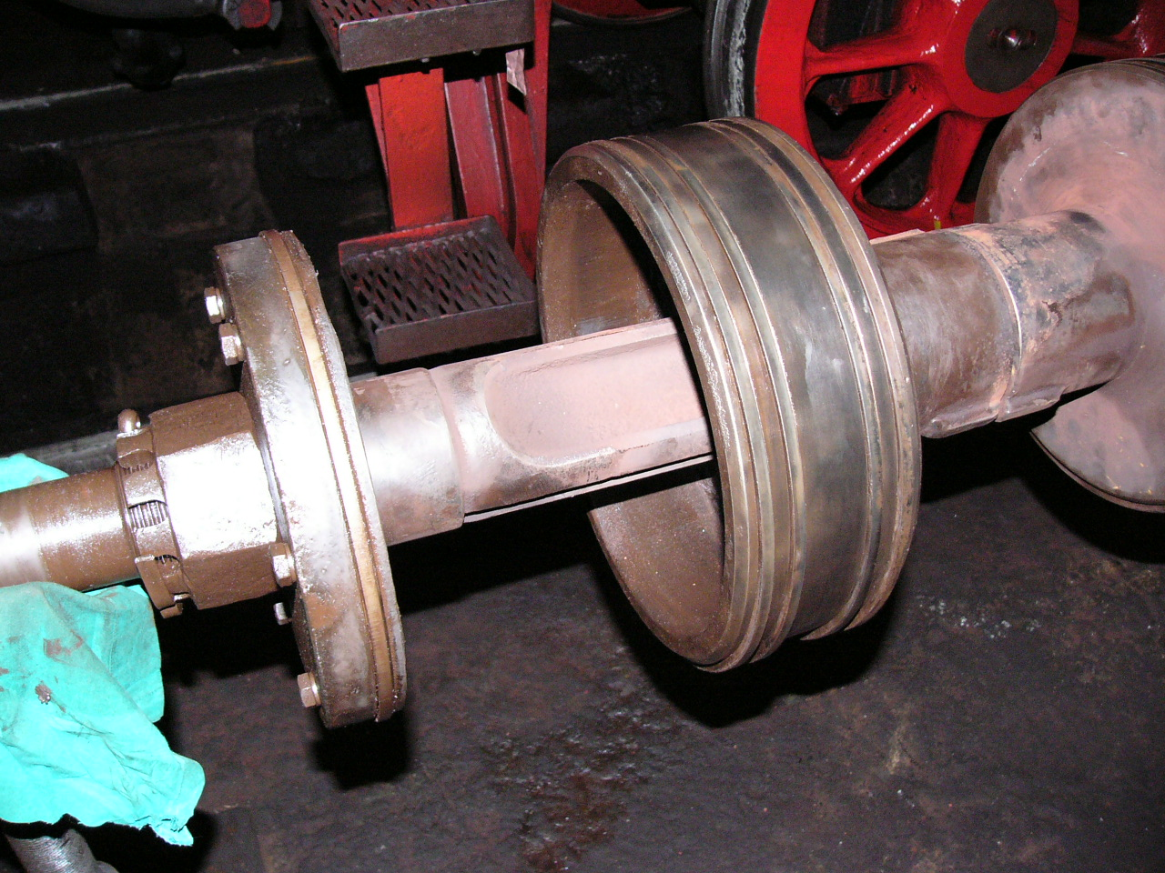 Trofimoff-Schieber der 41 1144-9 Schieberkörper offen, Stützplatte